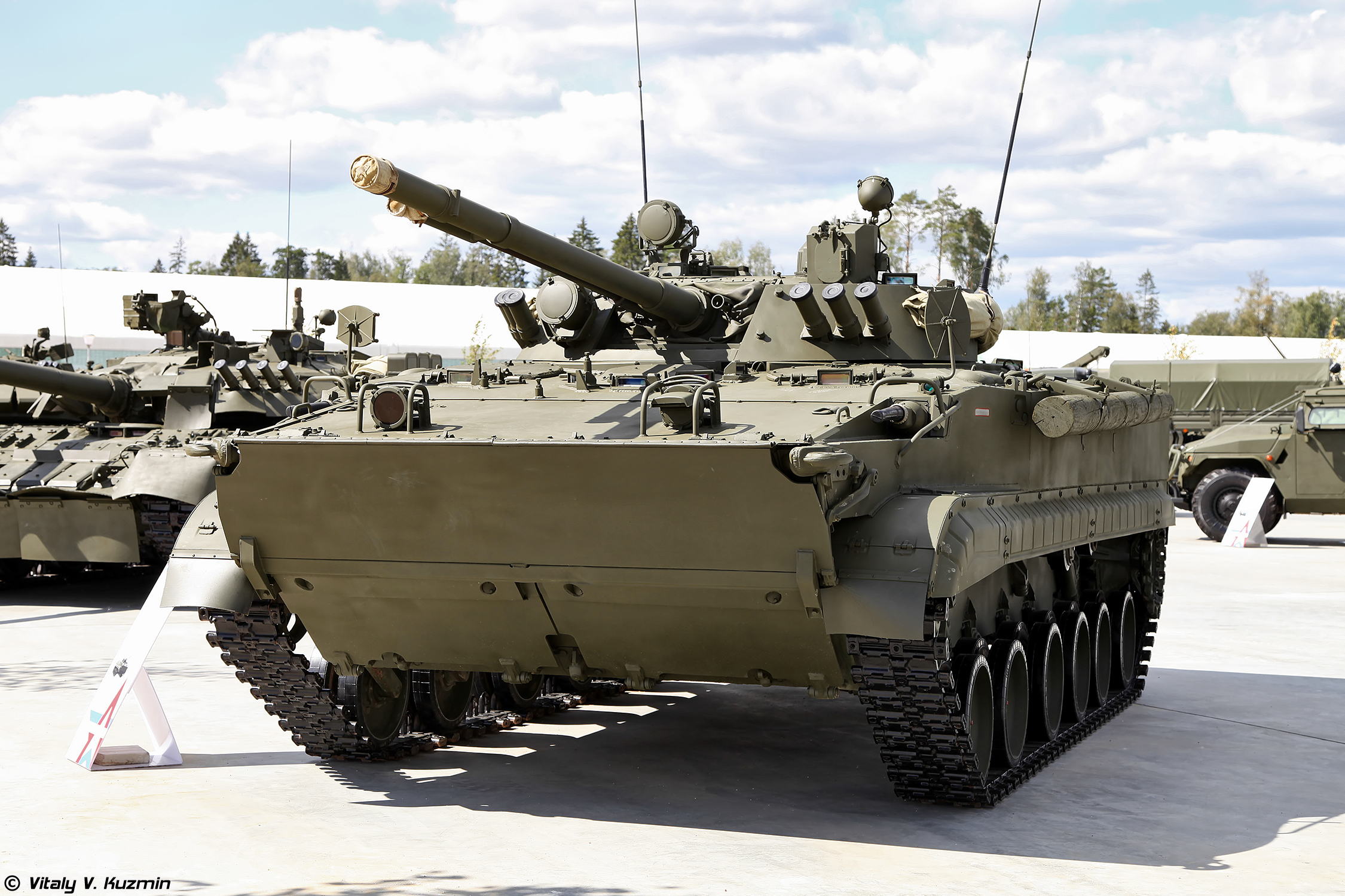 БМП-3 (BMP-3)